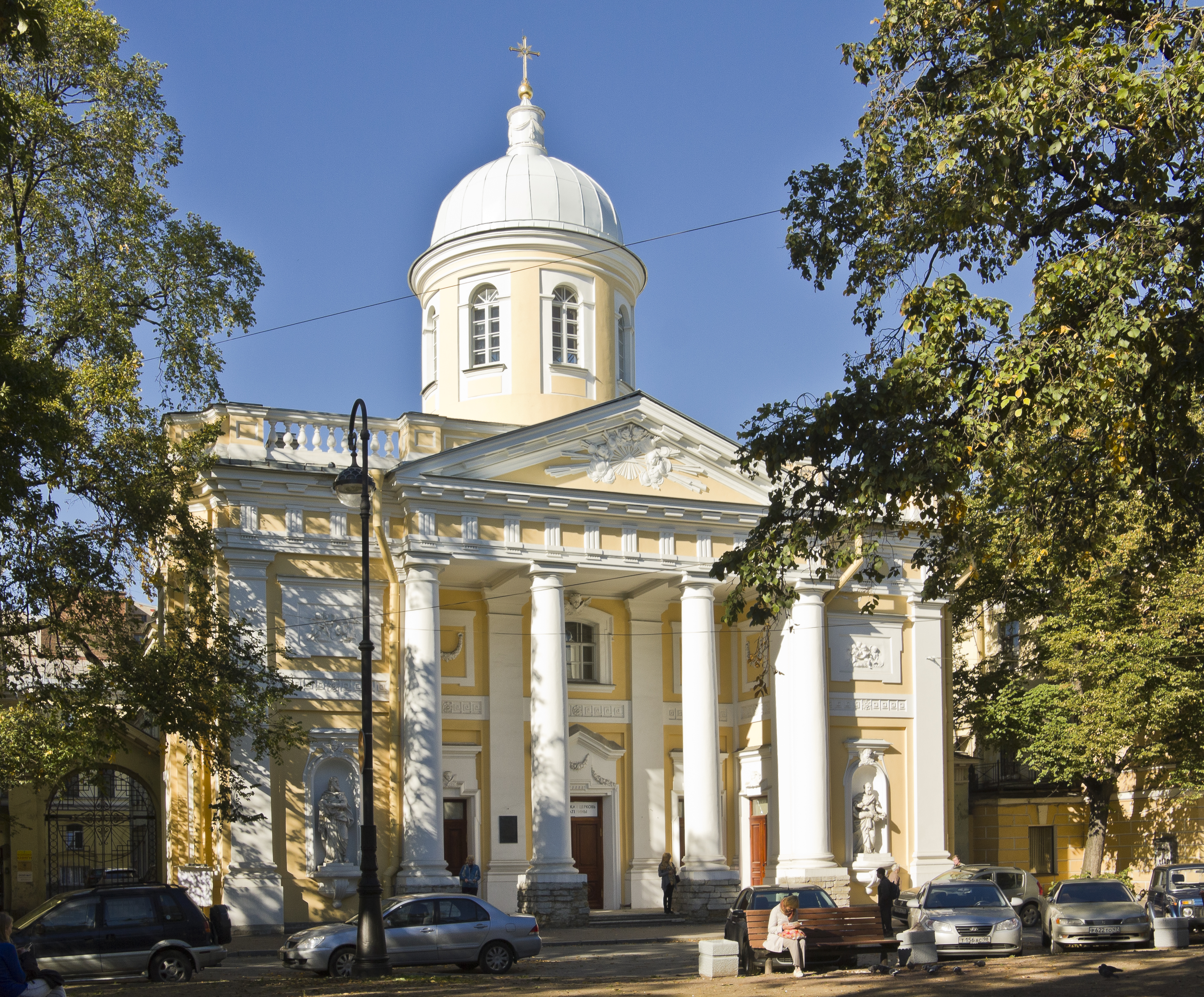 Большой пр.В.О., д.1